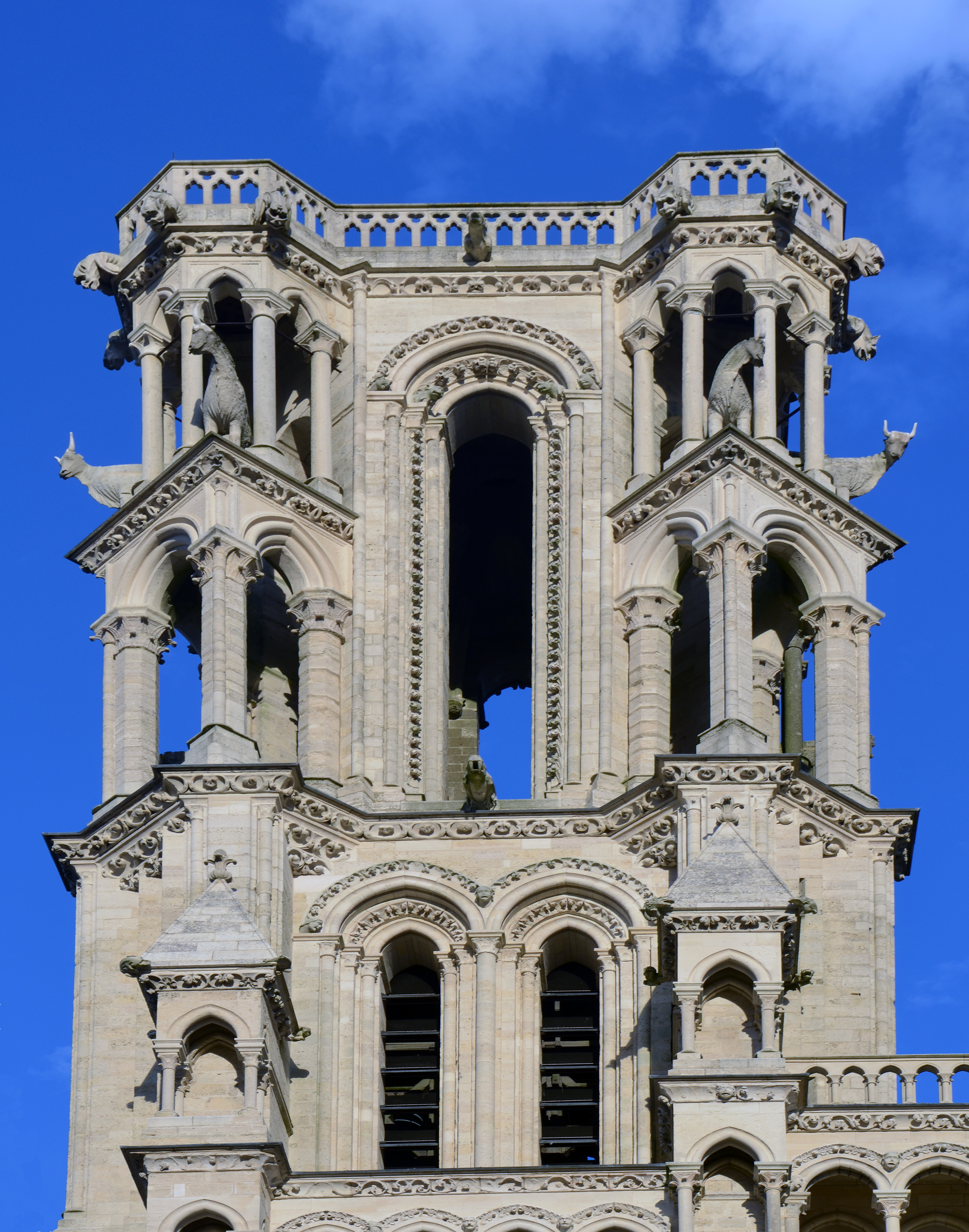 Tour nord de la façade occidentale de la cathédrale Notre-dame de Laon, Aisne, France.